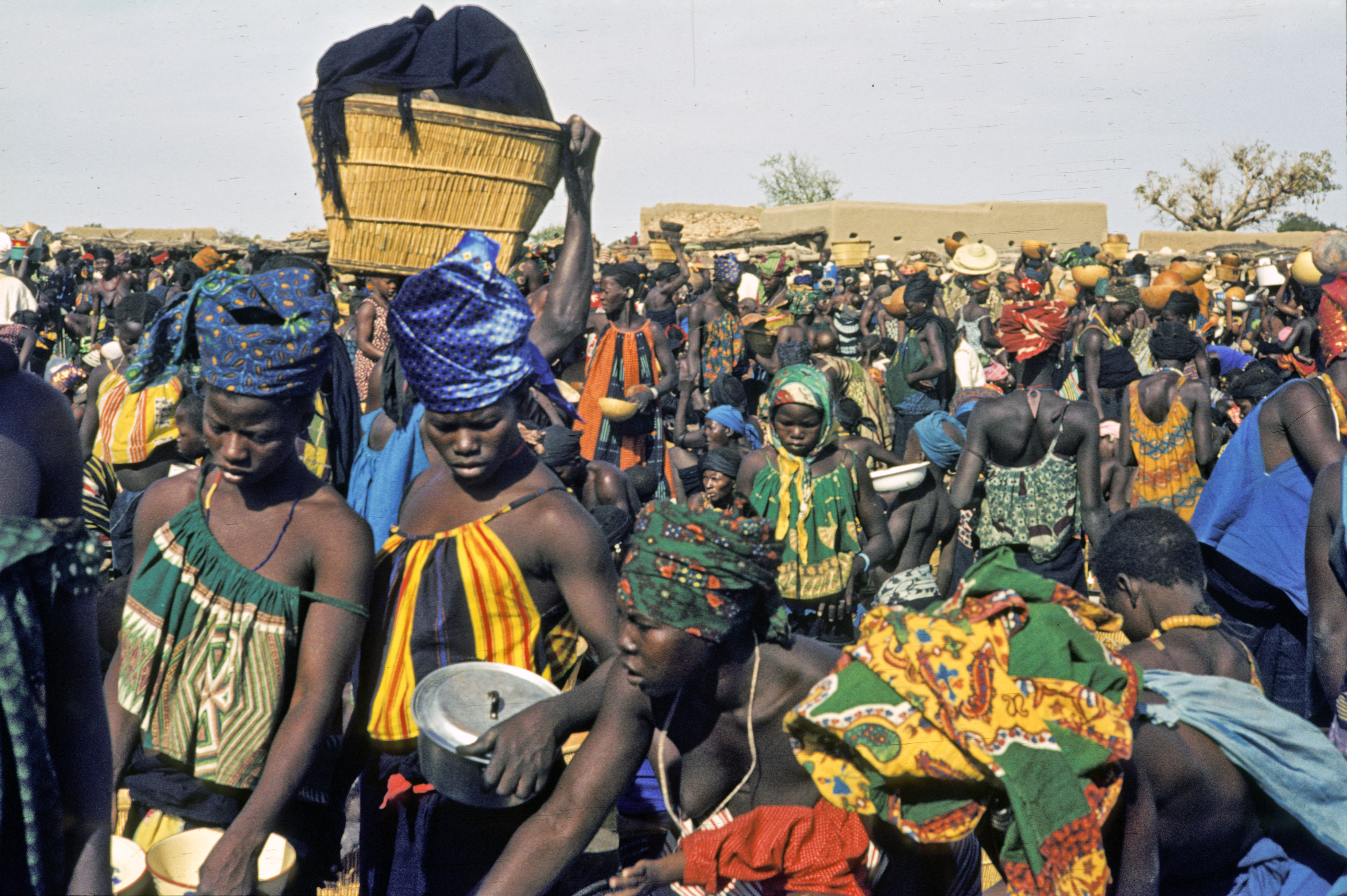 Mali